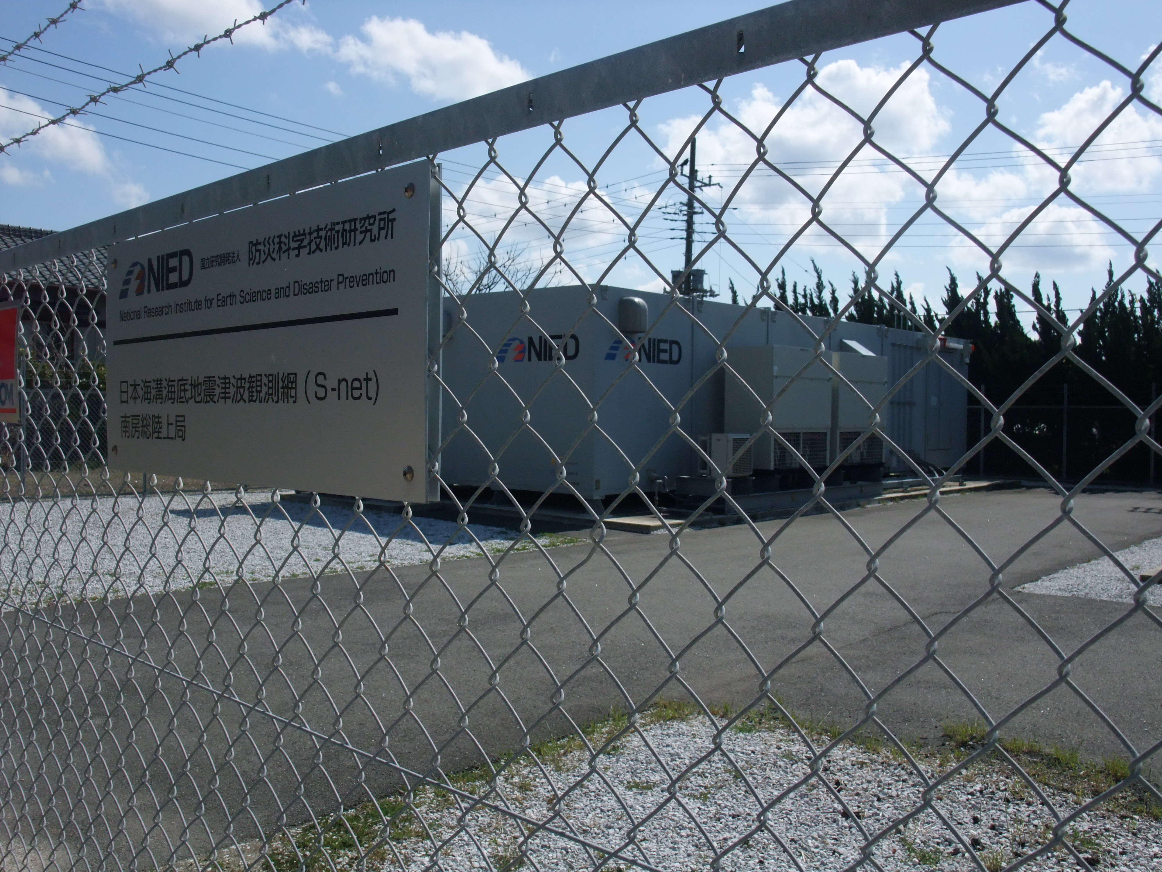 南房総市の廃校になった旧長尾小学校内に設置された防災科学技術研究所が管理・運用する日本海溝海底地震津波観測網(S-net)の地上局。ここで観測された海底地震に伴う津波情報は東海道新幹線の緊急停止用にも使われている。 Fujifilm FinePix F100fd